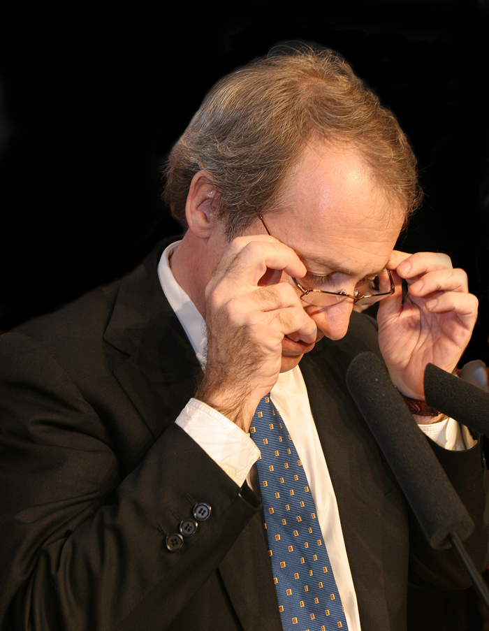 Luís Filipe Menezes, Vila Nova Gaia-Mayor